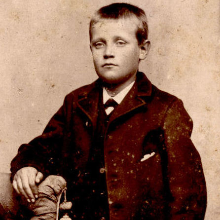 Dreng på Flakkebjerg Ungdomshjem